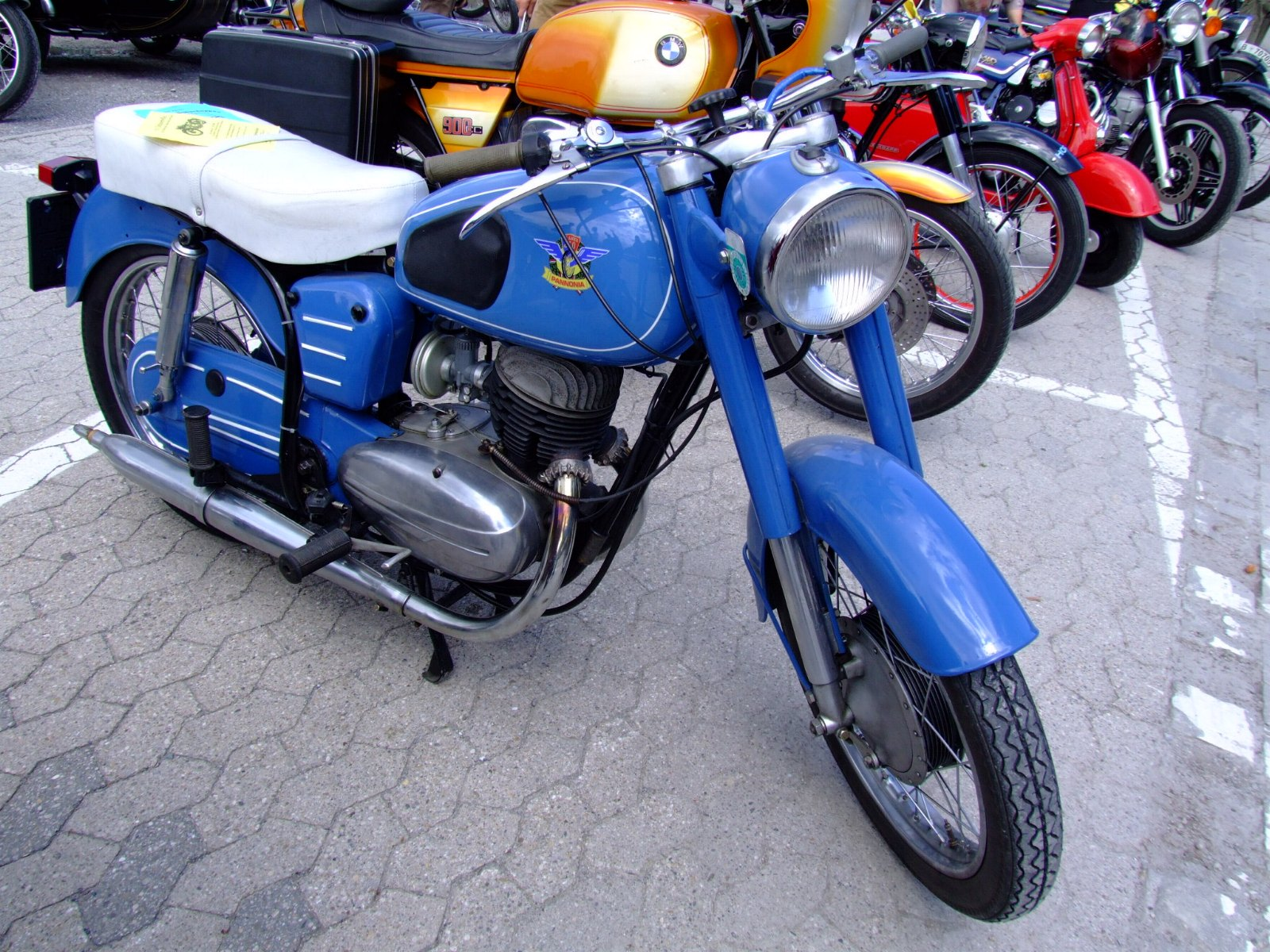 Pannonia_Csepel_250_T5_del 1960 - Ungheria